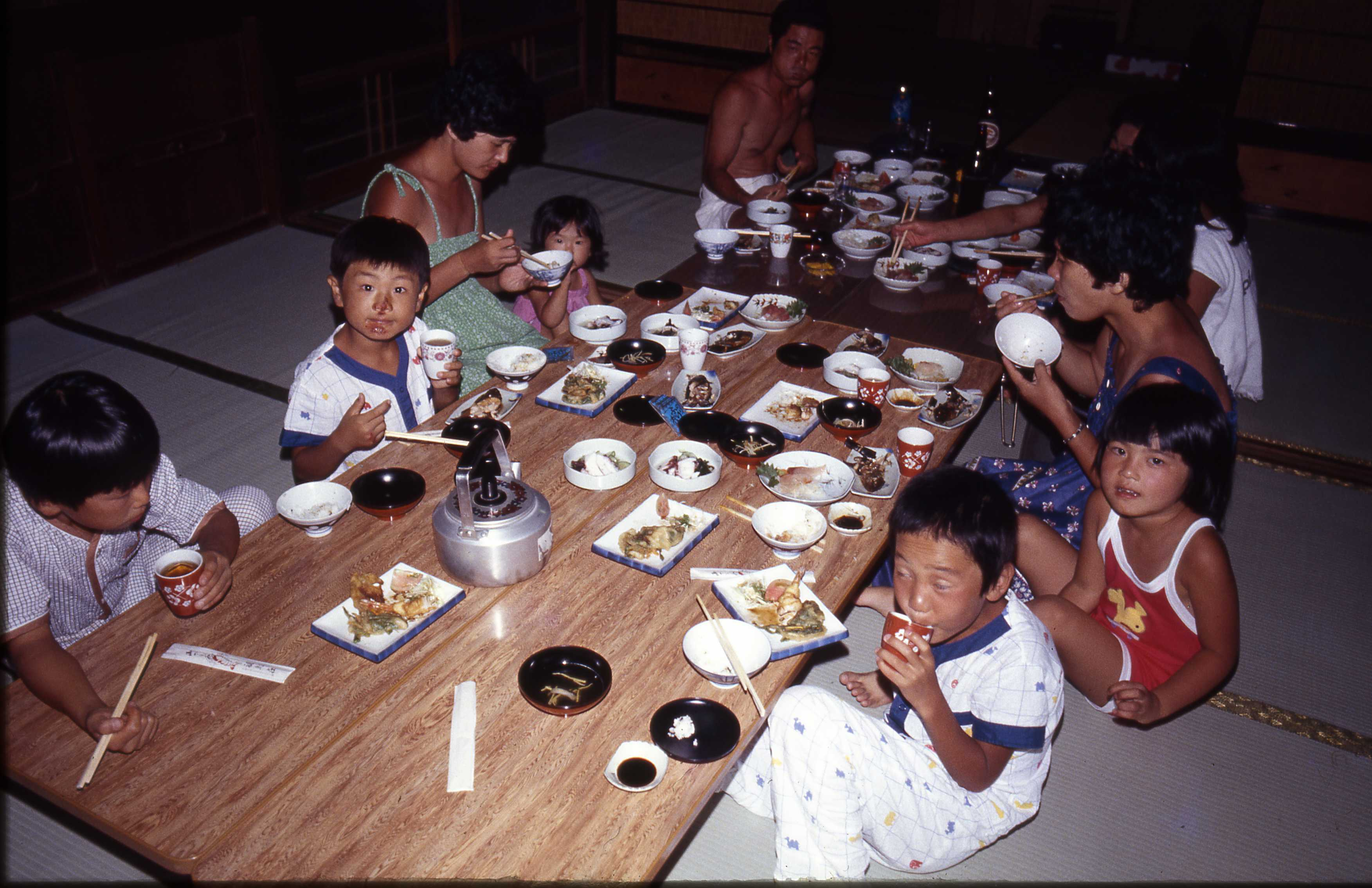 Awaji Minshuku 1980 Funase 1980年当時の淡路島の民宿 船瀬